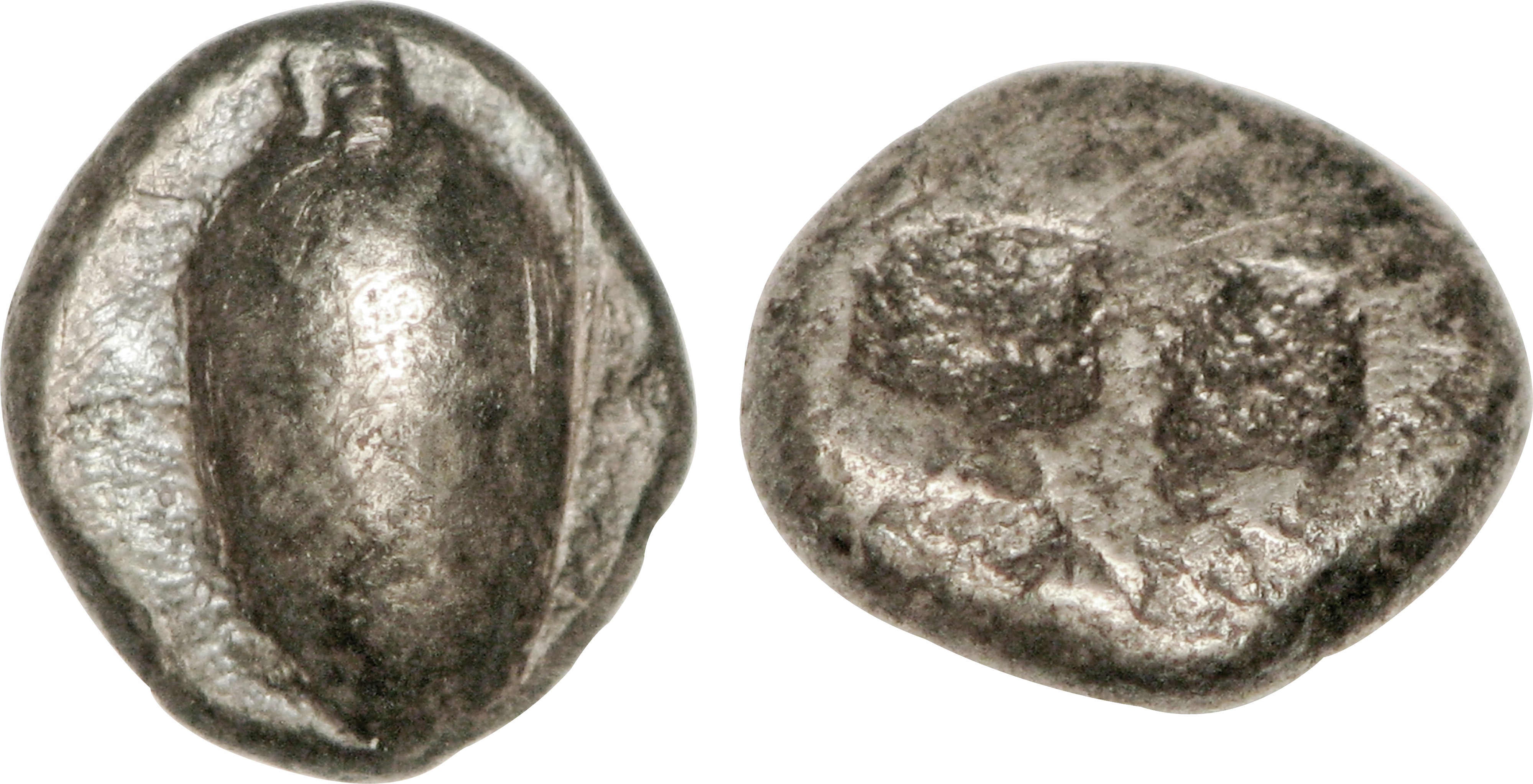 Nom de l'atelier : Béotie, Orchomène Métal : argent Diamètre : 8,5mm Poids : 0,92g. Titulature avers : Anépigraphe. Description avers : Grain de blé, la pointe en haut. Description revers : Carré creux quadripartite.